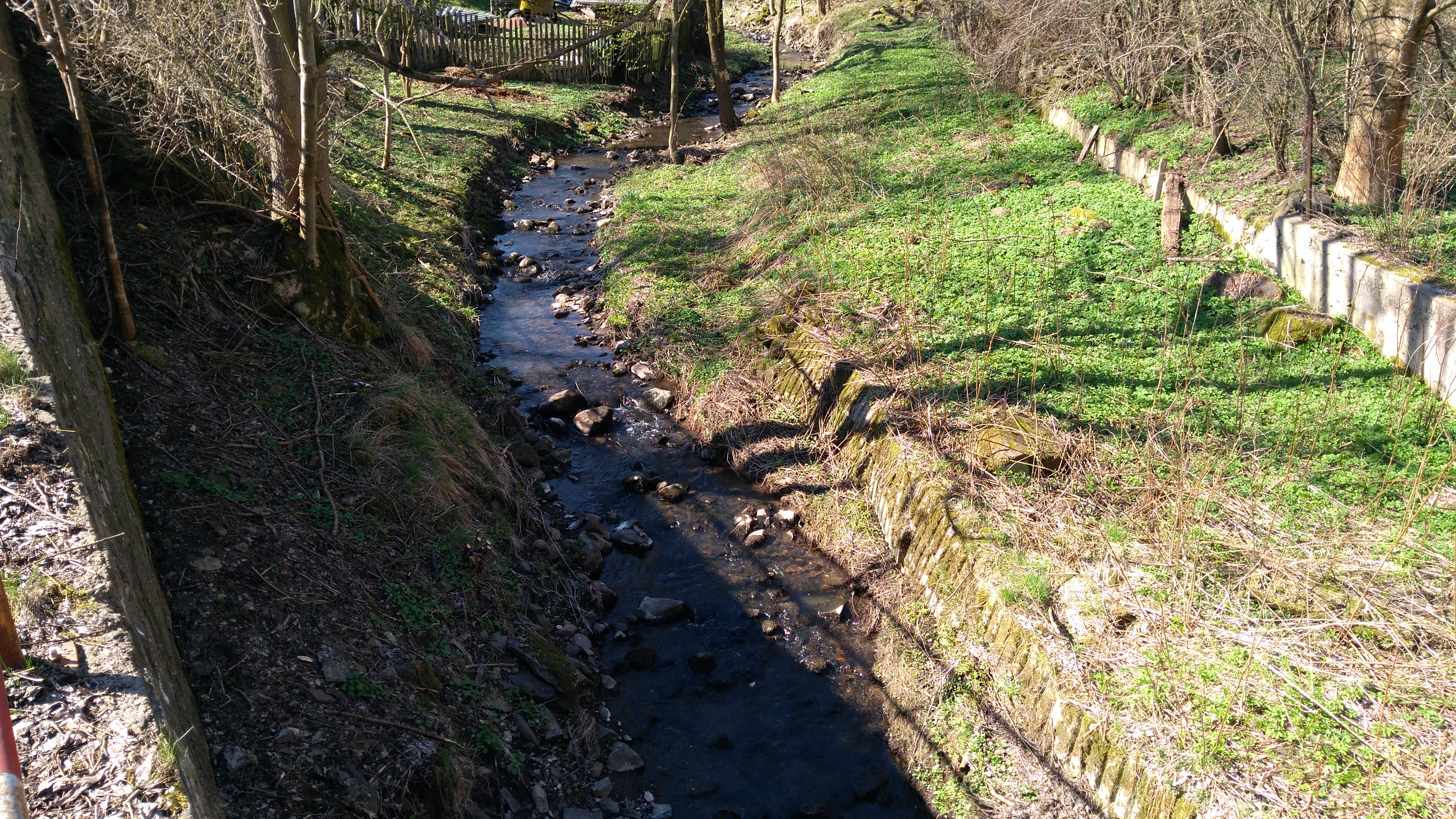 Potok.